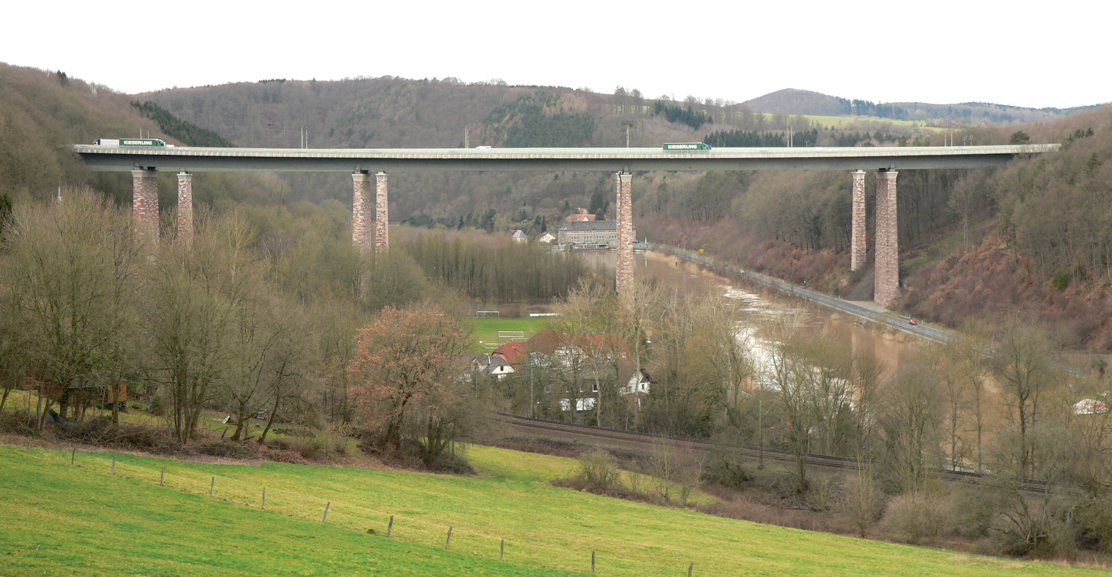 Werratalbrücke Hedemünden von Laubach gesehen